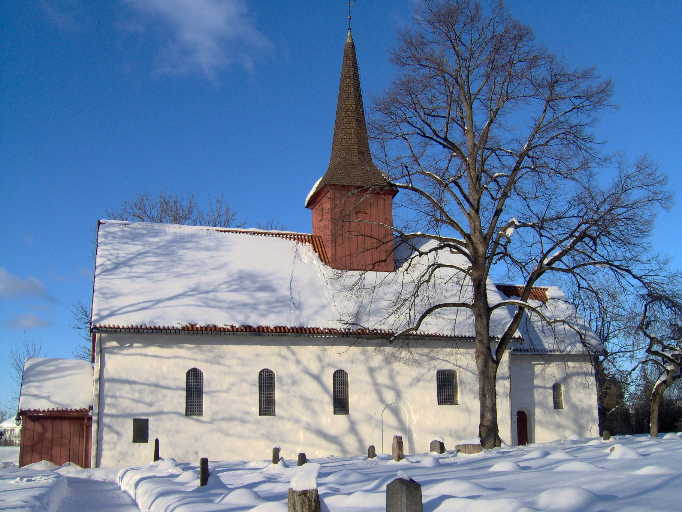 Tanum church in Bærum, Norway